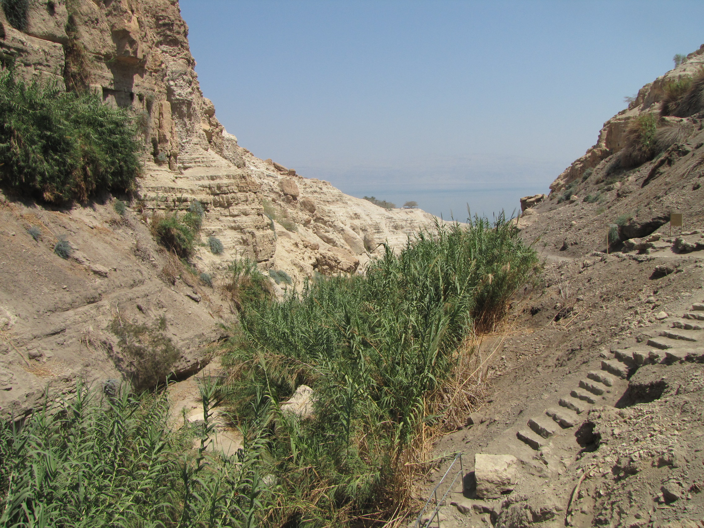 En Gedi (Ein Gedi), beim Toten Meer. Nachal David, Blick zum Toten Meer.